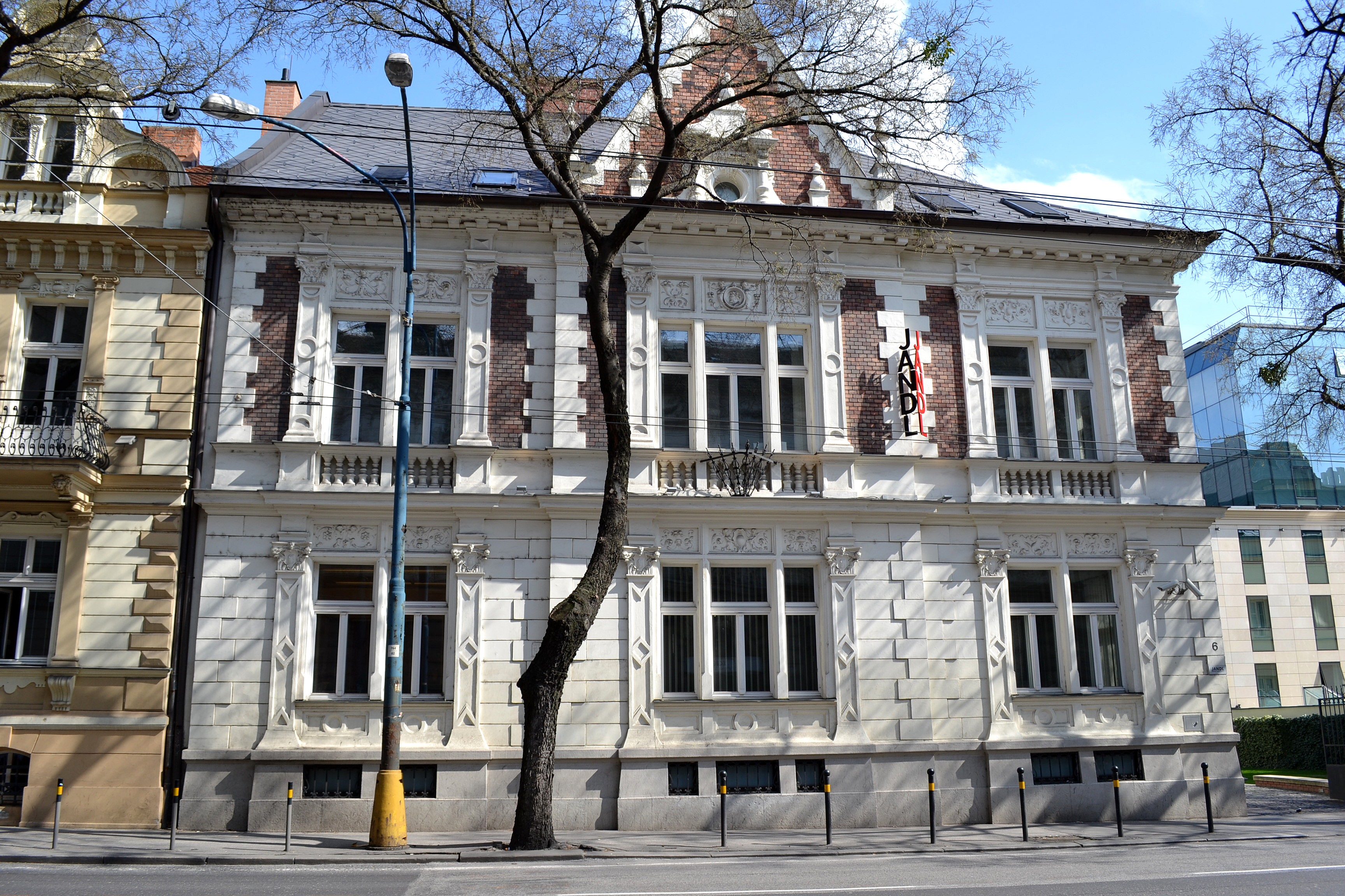 Vila na Štefánikovej ul. č. 6. Podľa projektu Alexandra Feiglera ju postavili v roku 1894